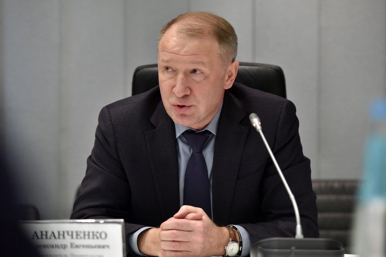 Александр Ананченко на заседании Правительства ДНР